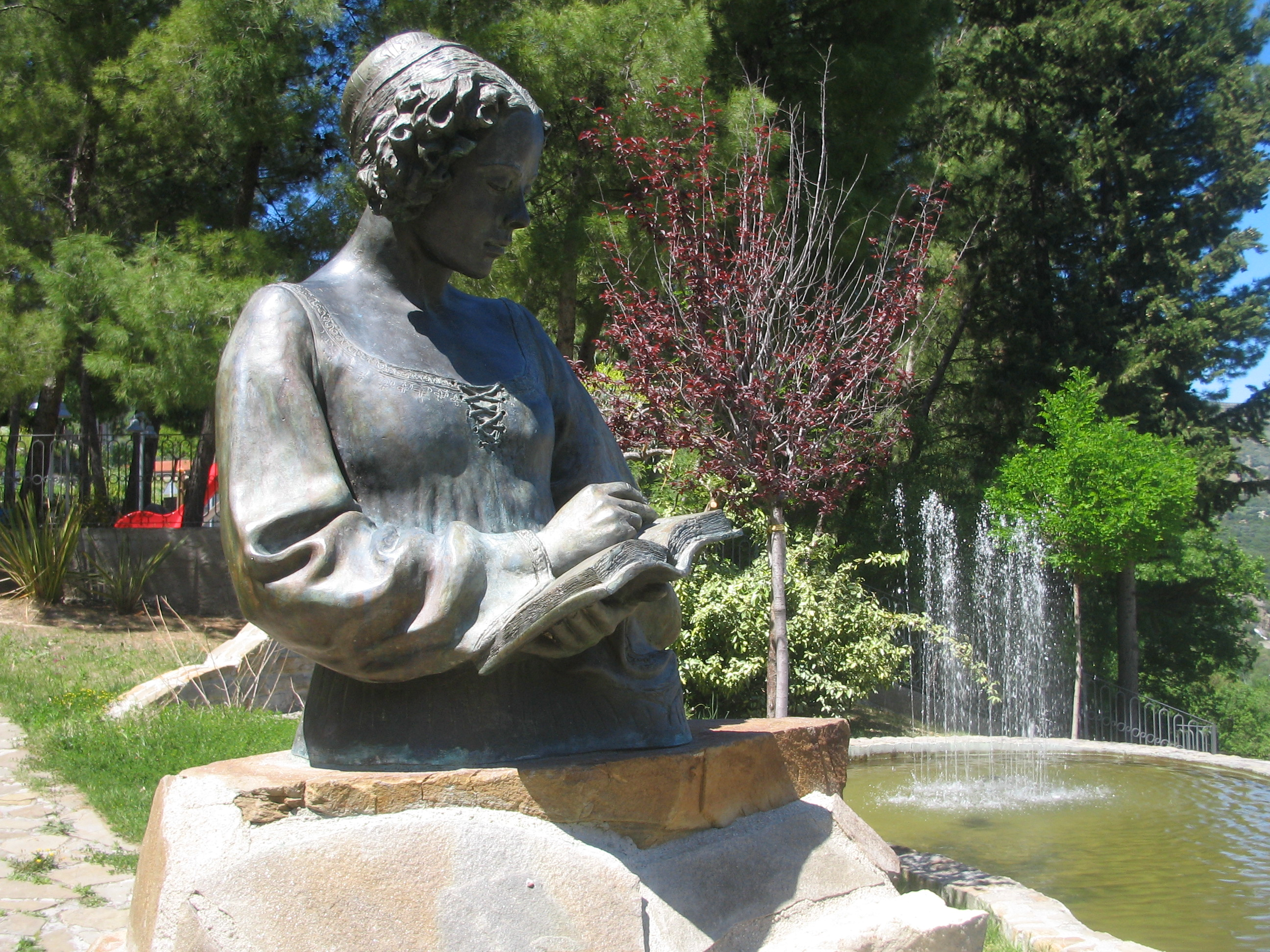 Monumento a Isabella Morra a Valsinni